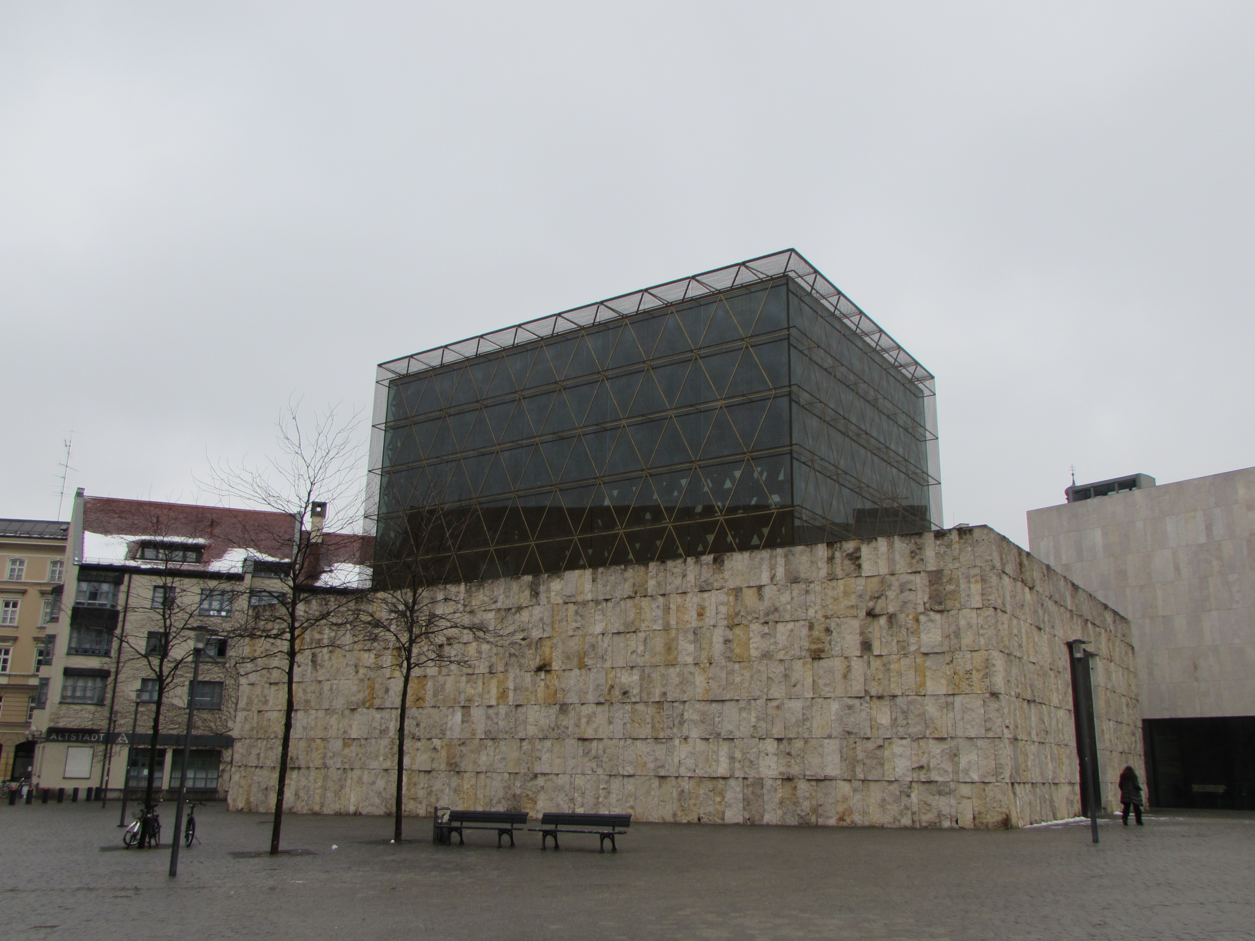 La Sinagoga di Monaco in un giorno di pioggia